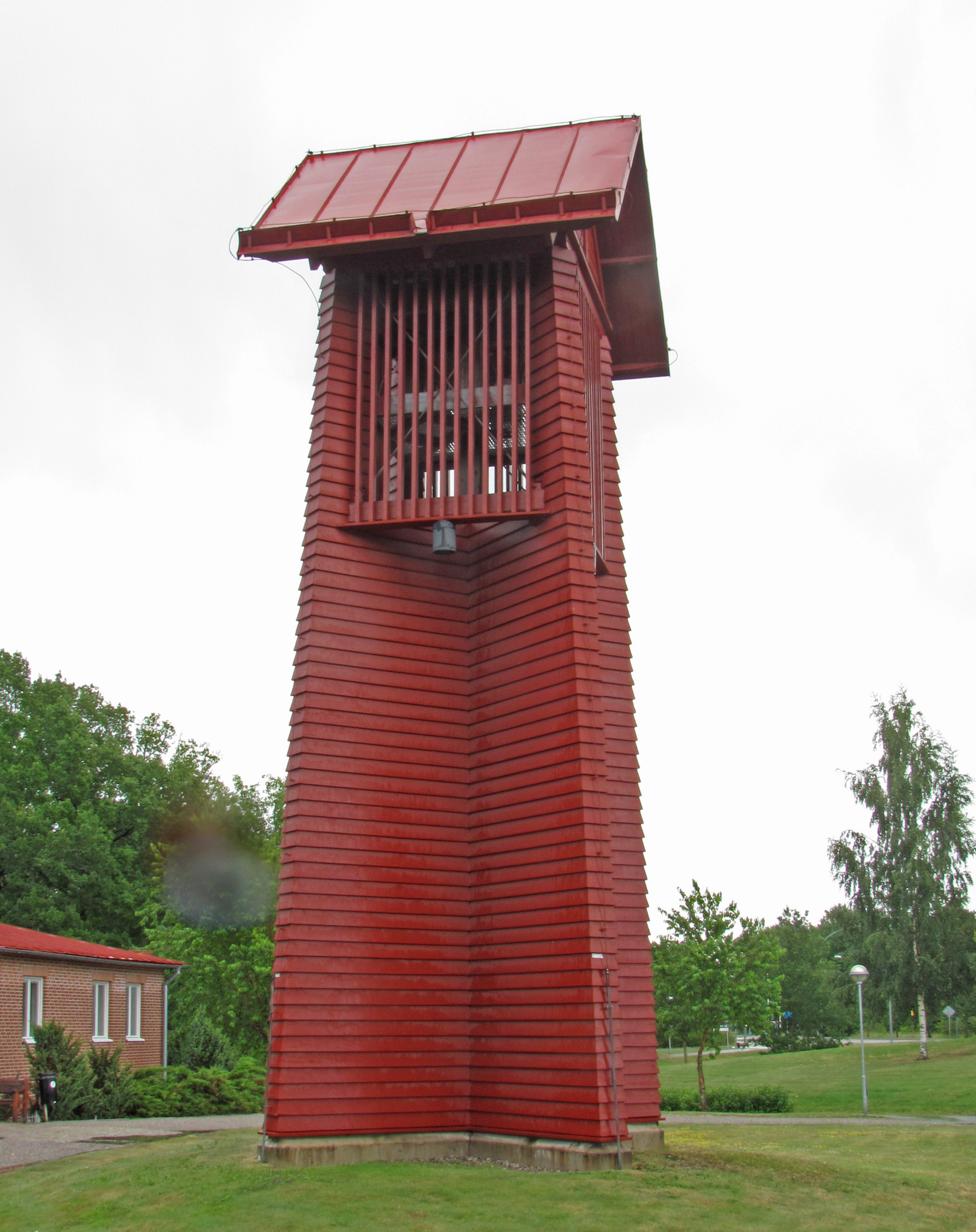 Tomaskyrkan, Eskilstuna, klockstapel